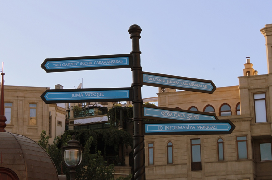 Указатели Ичери Шехер. Баку.